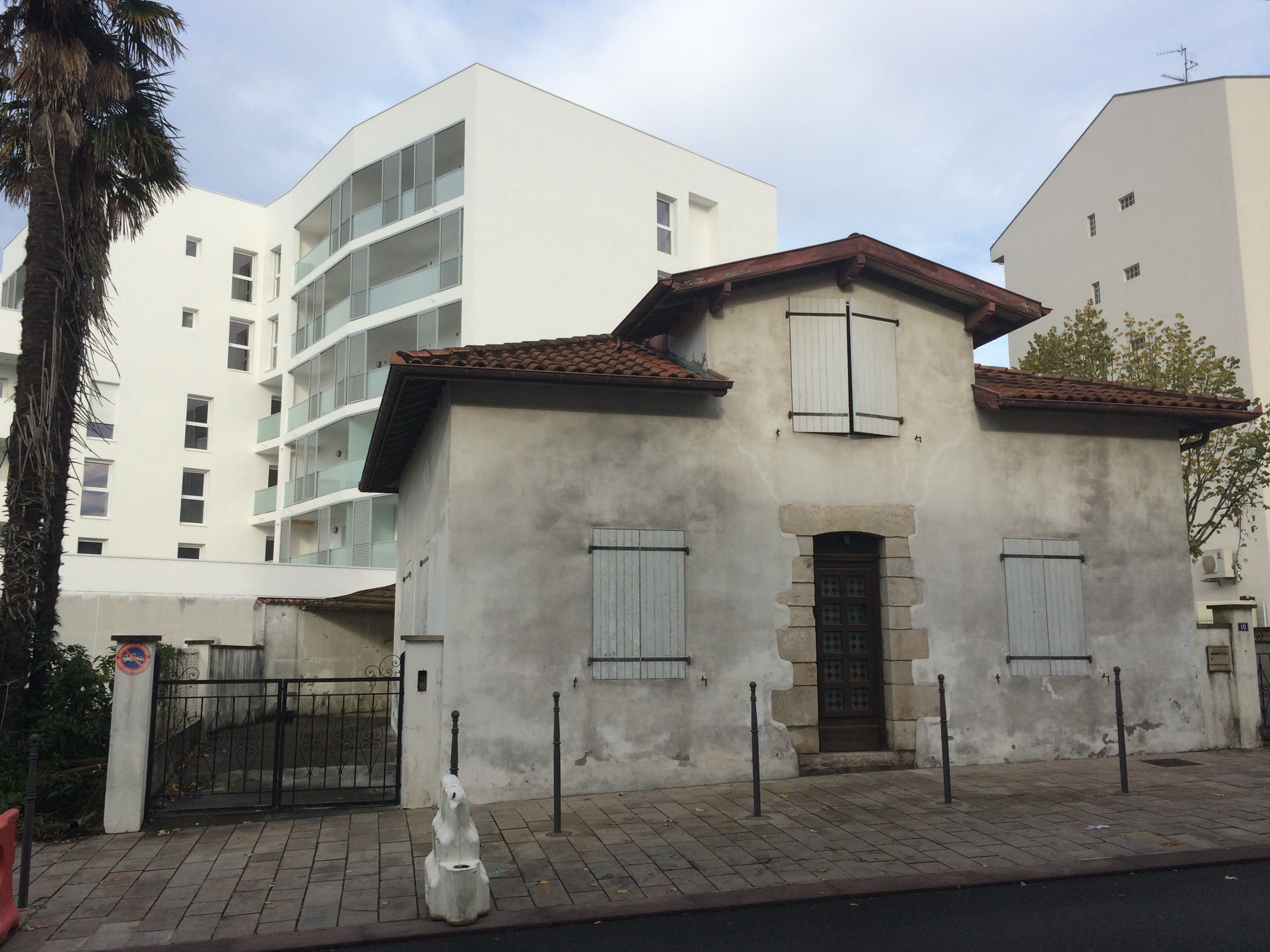 Contraste Anglet coeur de ville entre anciens et nouveaux